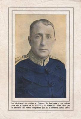 Tarjeta de propaganda electoral del candidato del Partido Progresista: general Jorge Ubico Castaneda.